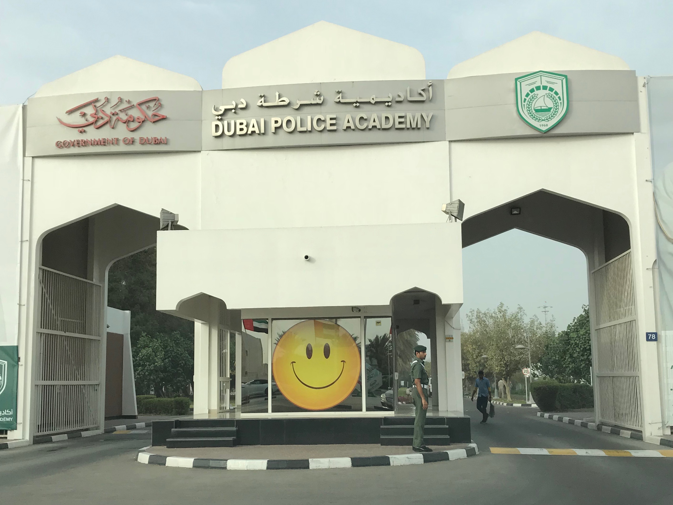 المدخل الرئيسي لاكاديمية شرطة دبي